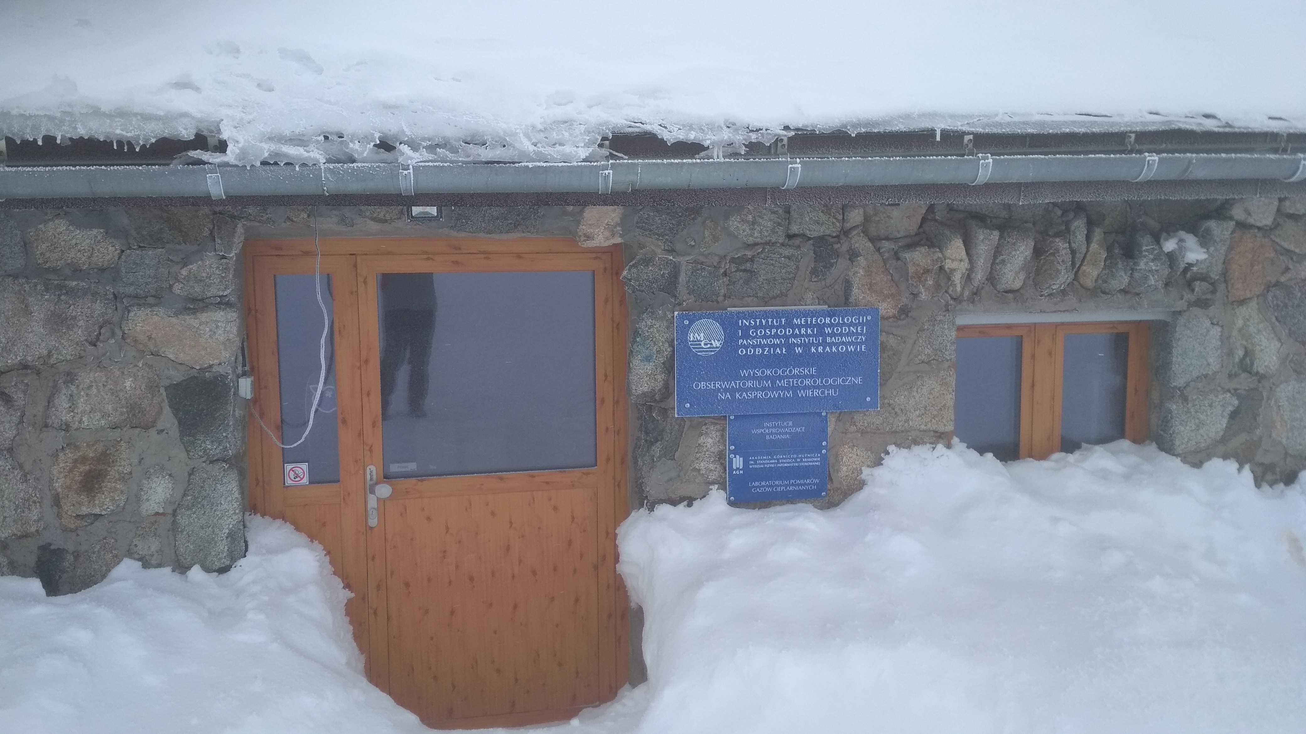 Вид на вхідні двері